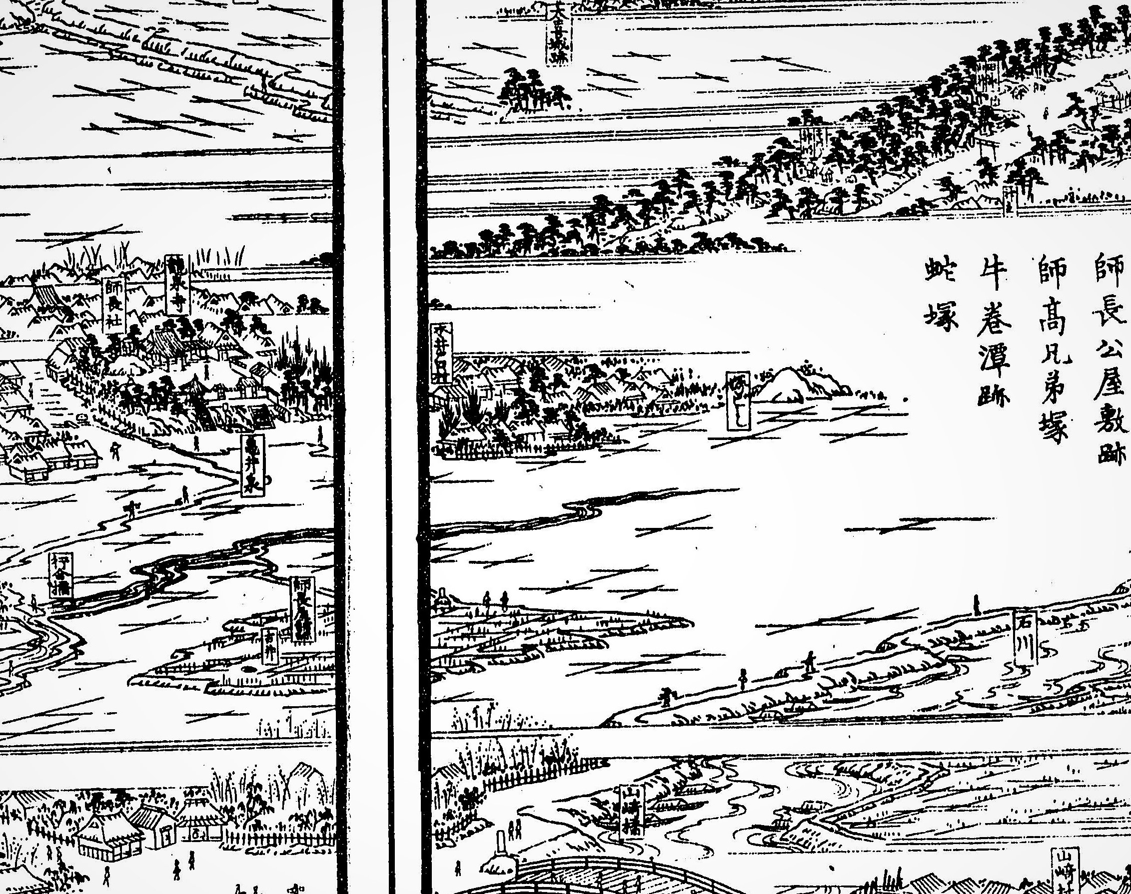 井戸田町付近の様子を表した古地図です。「尾張名所図会 巻五」より。